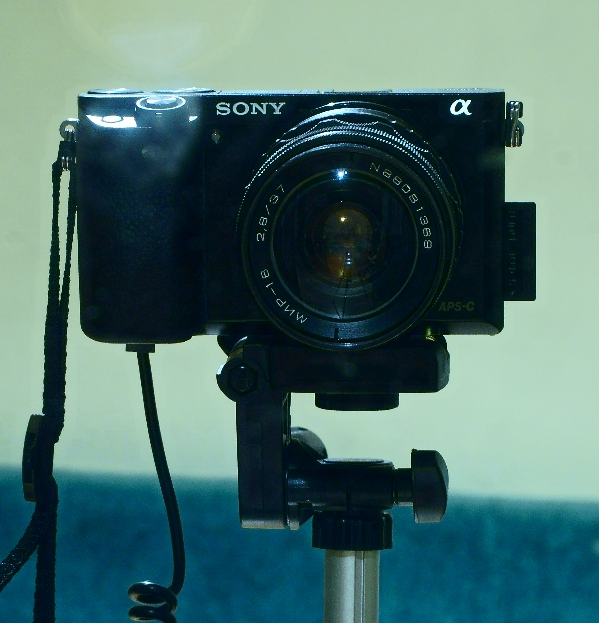 Sony a6000 camera on a tripod, with external power supply and Soviet lens attached